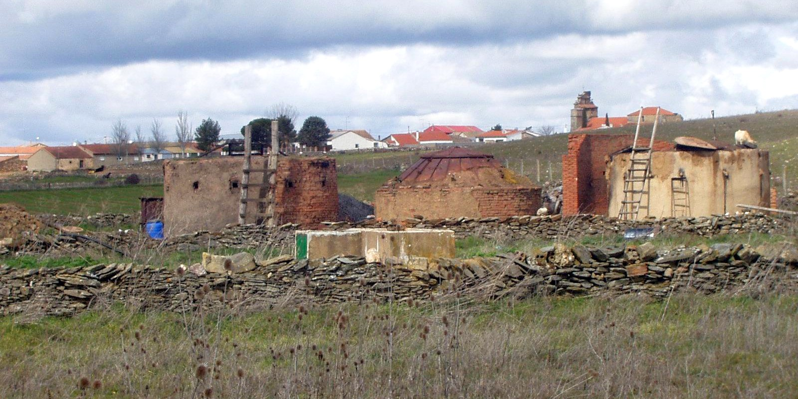 Villalba de los Llanos. Las Hospitalas. Carbonera. Campo Charro. Salamanca